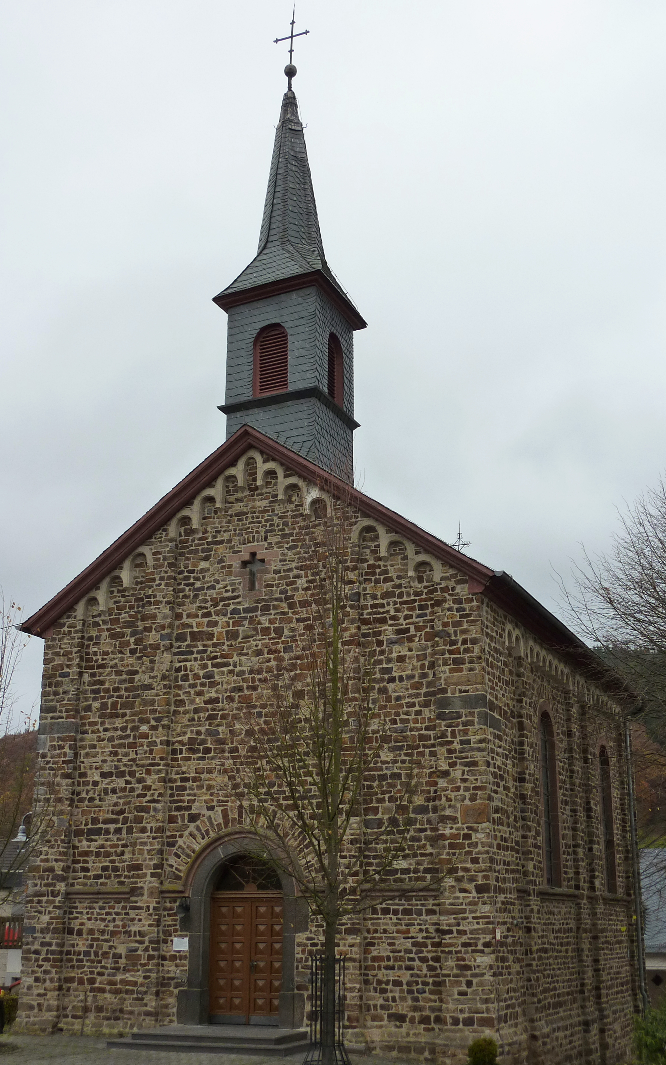 Schutzengelkapelle in Herresbach